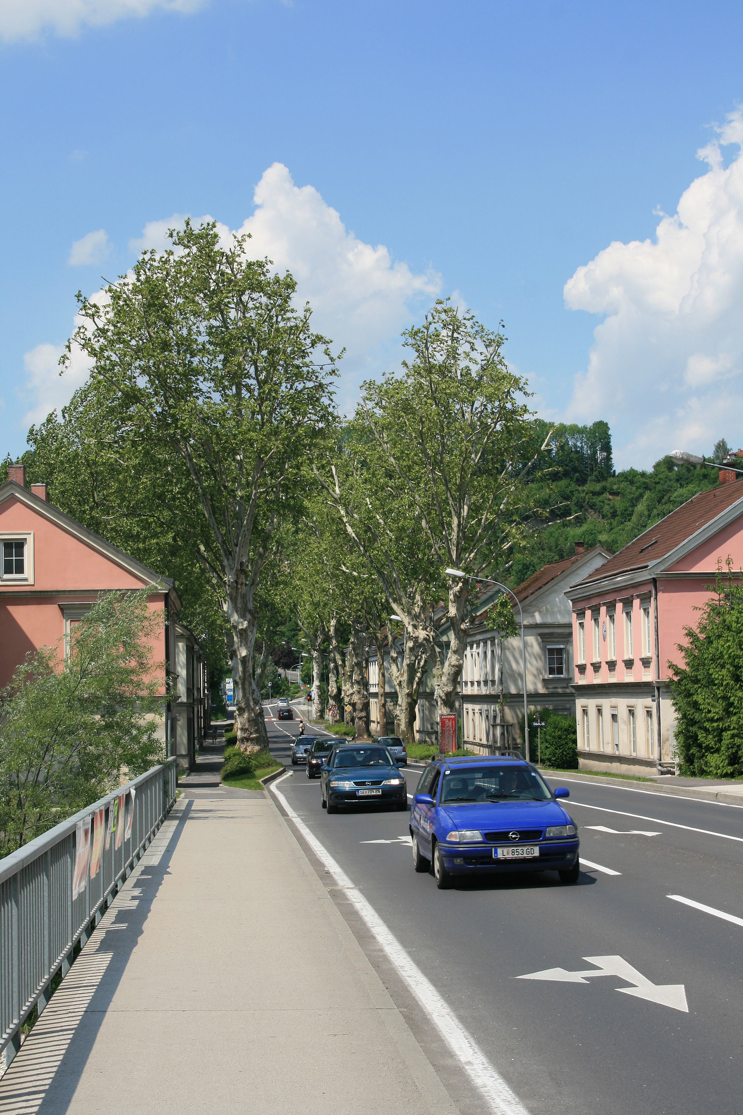 Die Schwimmschulstraße in Steyr mit Häusern der Siedlung Eysnfeld. Blick von der Kalkofenbrücke